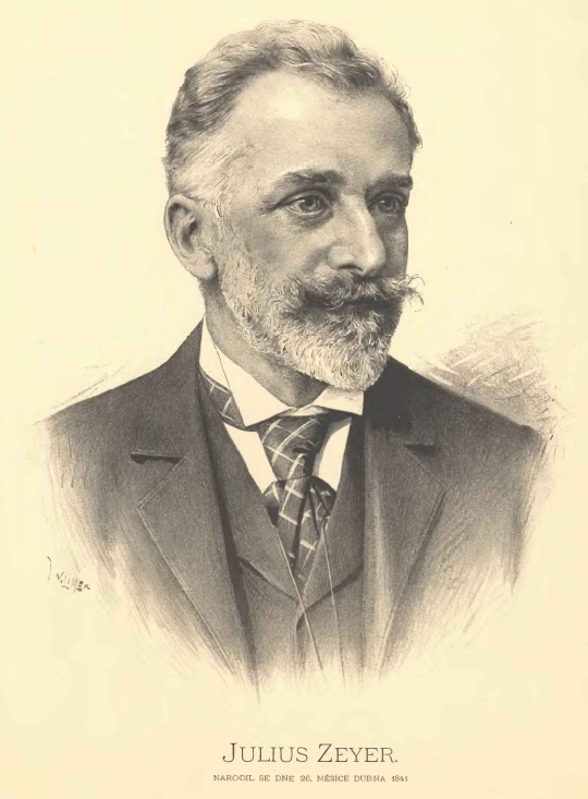 Portréty českých osobností od Jana Vilímka